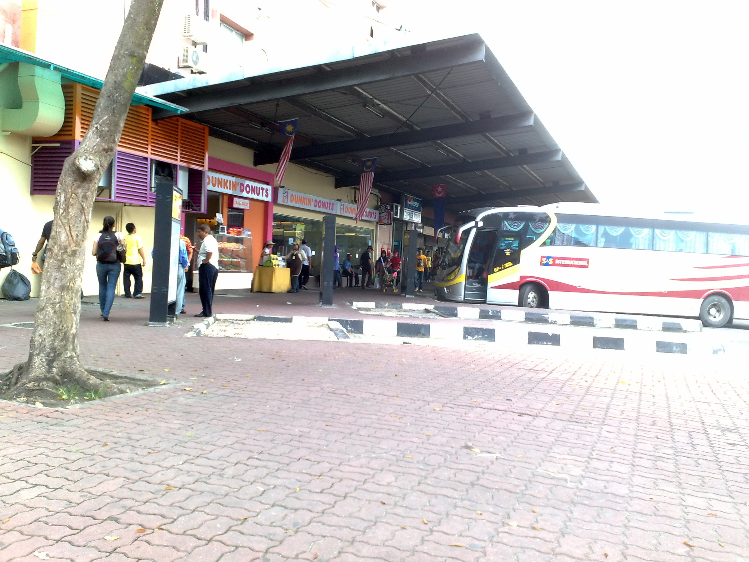 Larkin Bus Terminal, Johor Bahru, Johor, Malaysia.